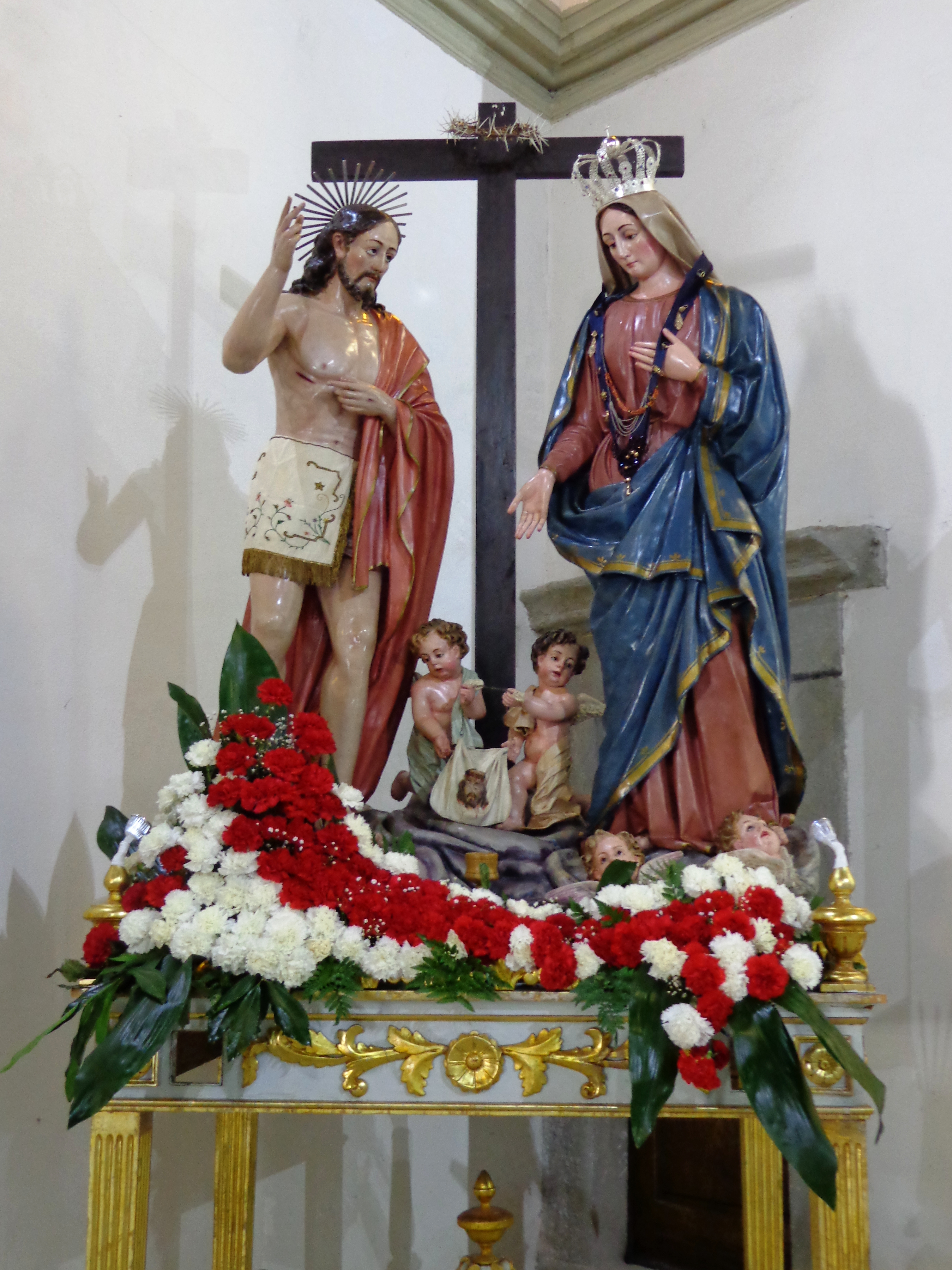 Castroreale_04_2014_13